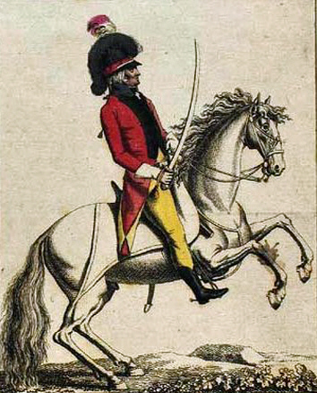 Friedrich Carl Christian Ulrich von Ahlefeldt, geboren 12 November 1742 in Augustenborg, Åbenrå, gestorben 25. Juni 1825 in Itzehoe.